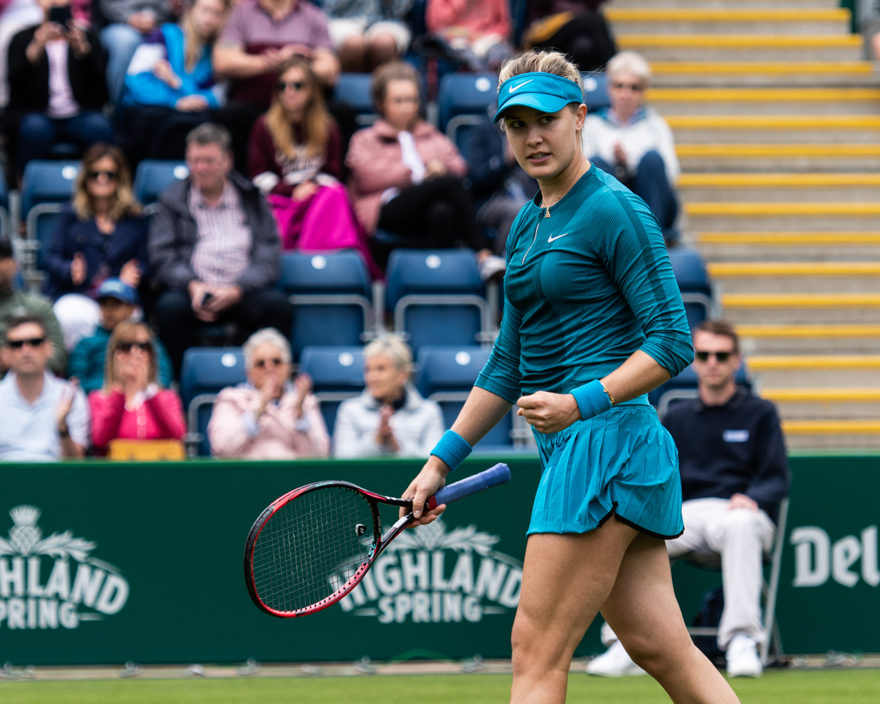 Genie Bouchard